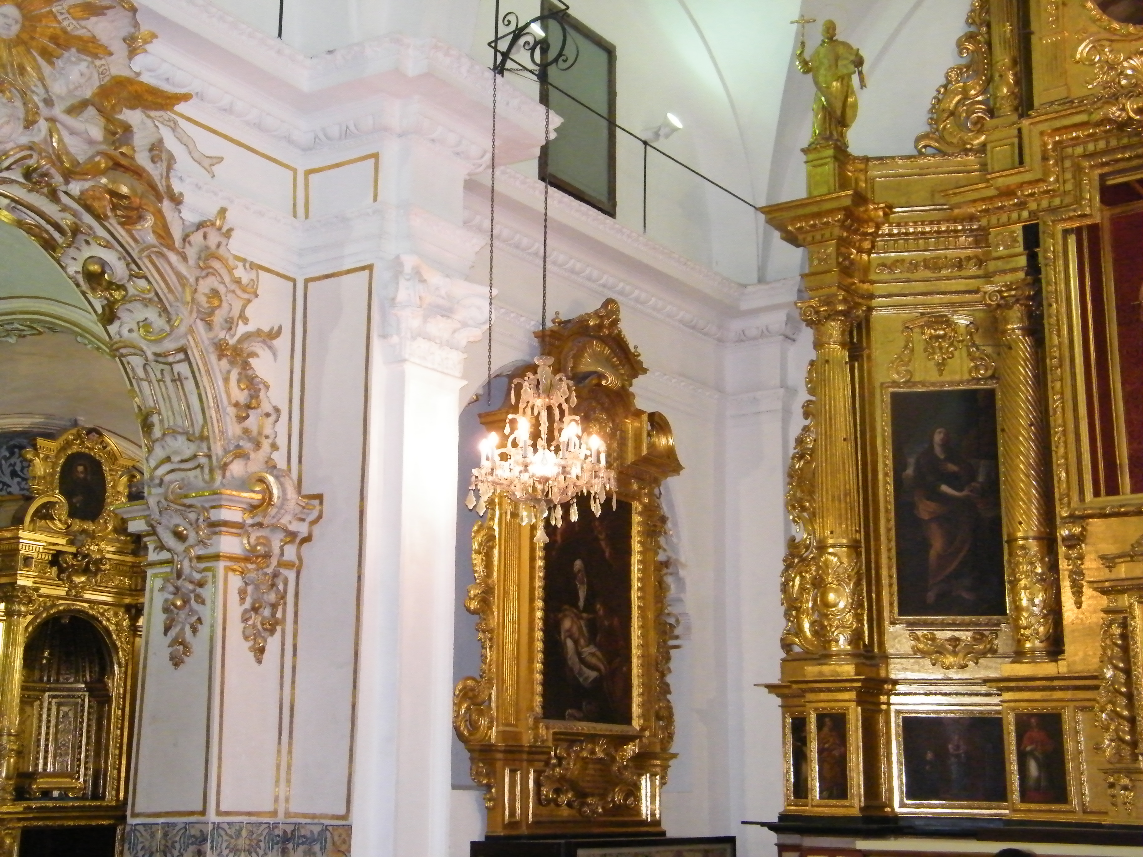 Vista de la Capilla del Instituto de Enseñanza Secundaria Luis Vives de Valencia.